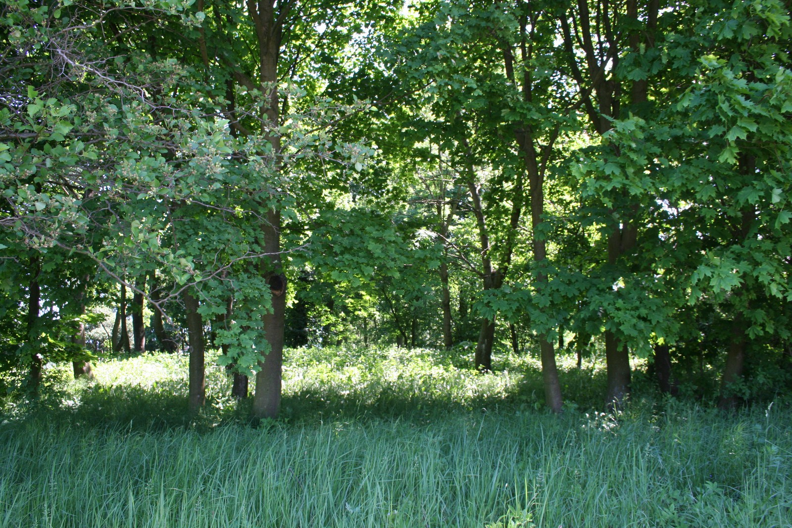 Tytlewo - park dworski, 2 poł. XIX w.